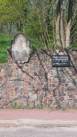 Stary cmentarz w Gubinie (foto Monika Ciszewska)